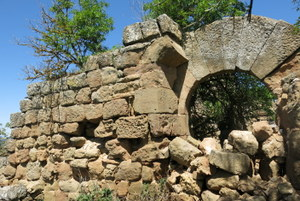 castell de Claret a la comarca de la Segarra - Catalunya